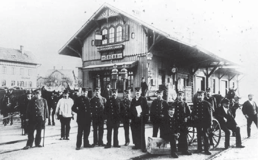 Bahnhof Winterthur-Töss mit Mitarbeitern im Jahr 1880